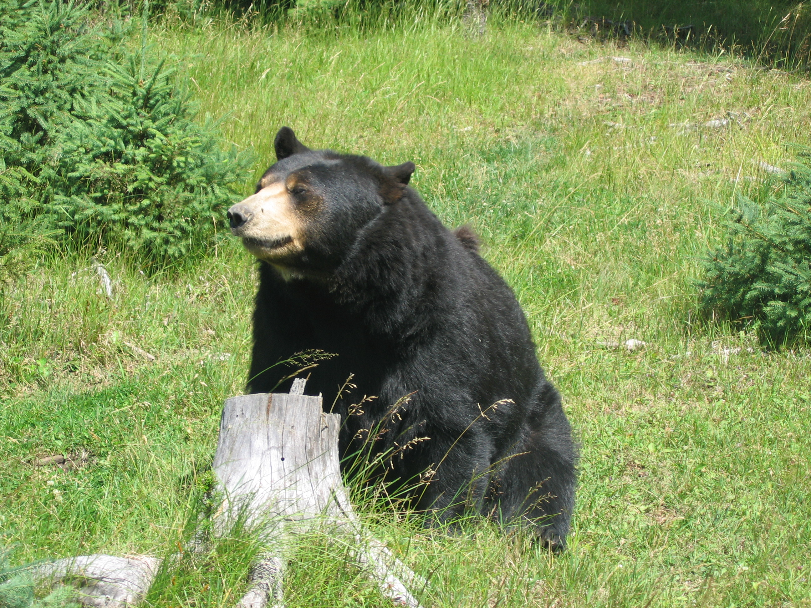 Ursus americanus